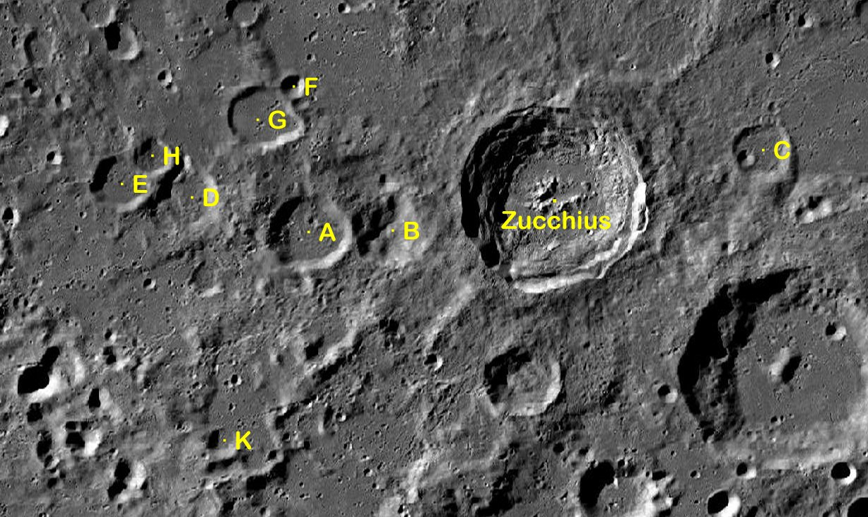 Cráter lunar Zucchius. Cráteres satélite. (Imagen LRO)